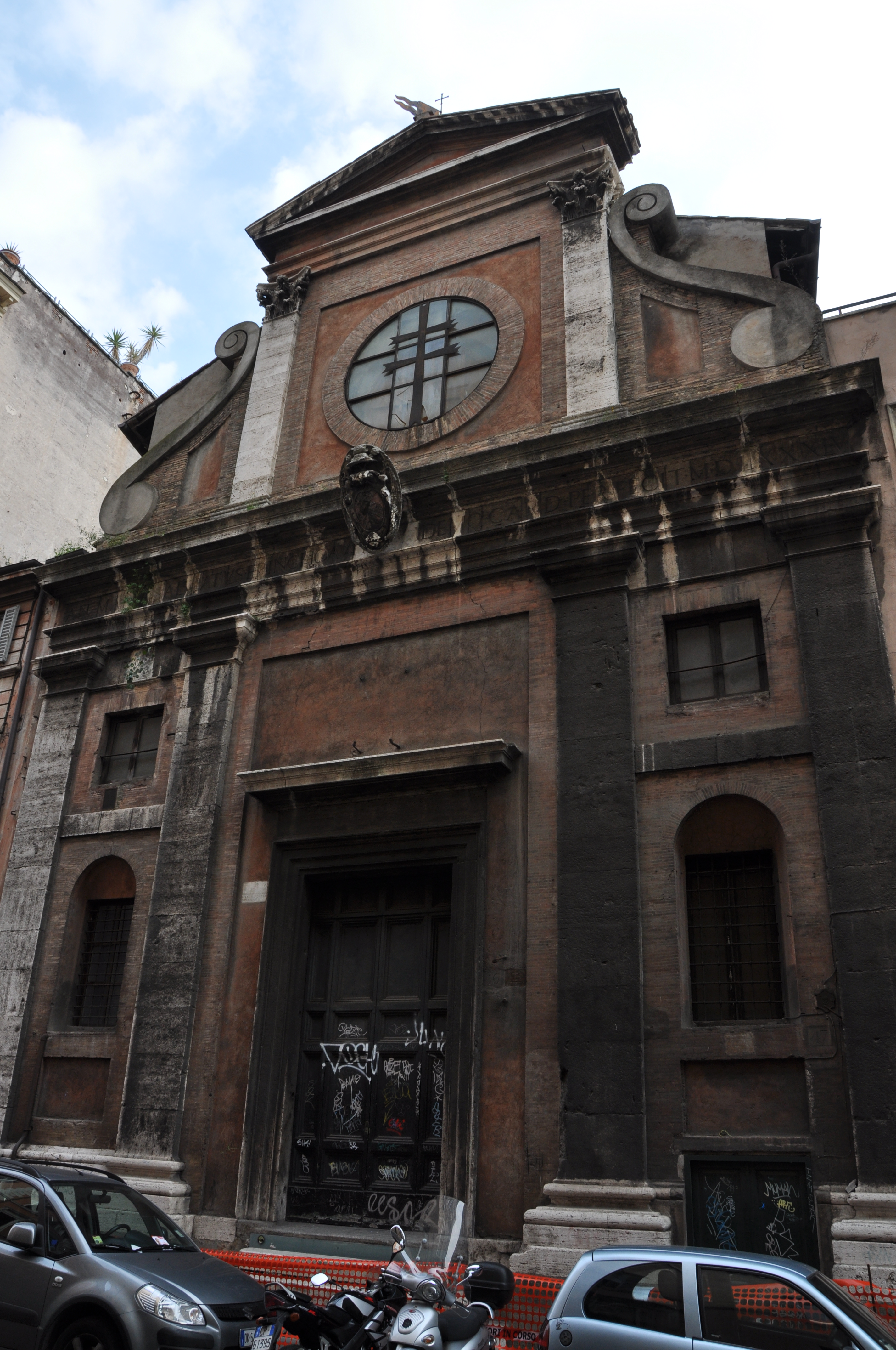 Roma, via di Ripetta. Sala Lancisiana di san Giacomo in Augusta